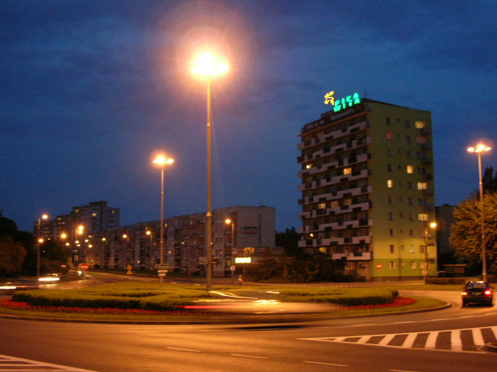 Piła - Centrum miasta nocą Autor - Bartek Wawraszko